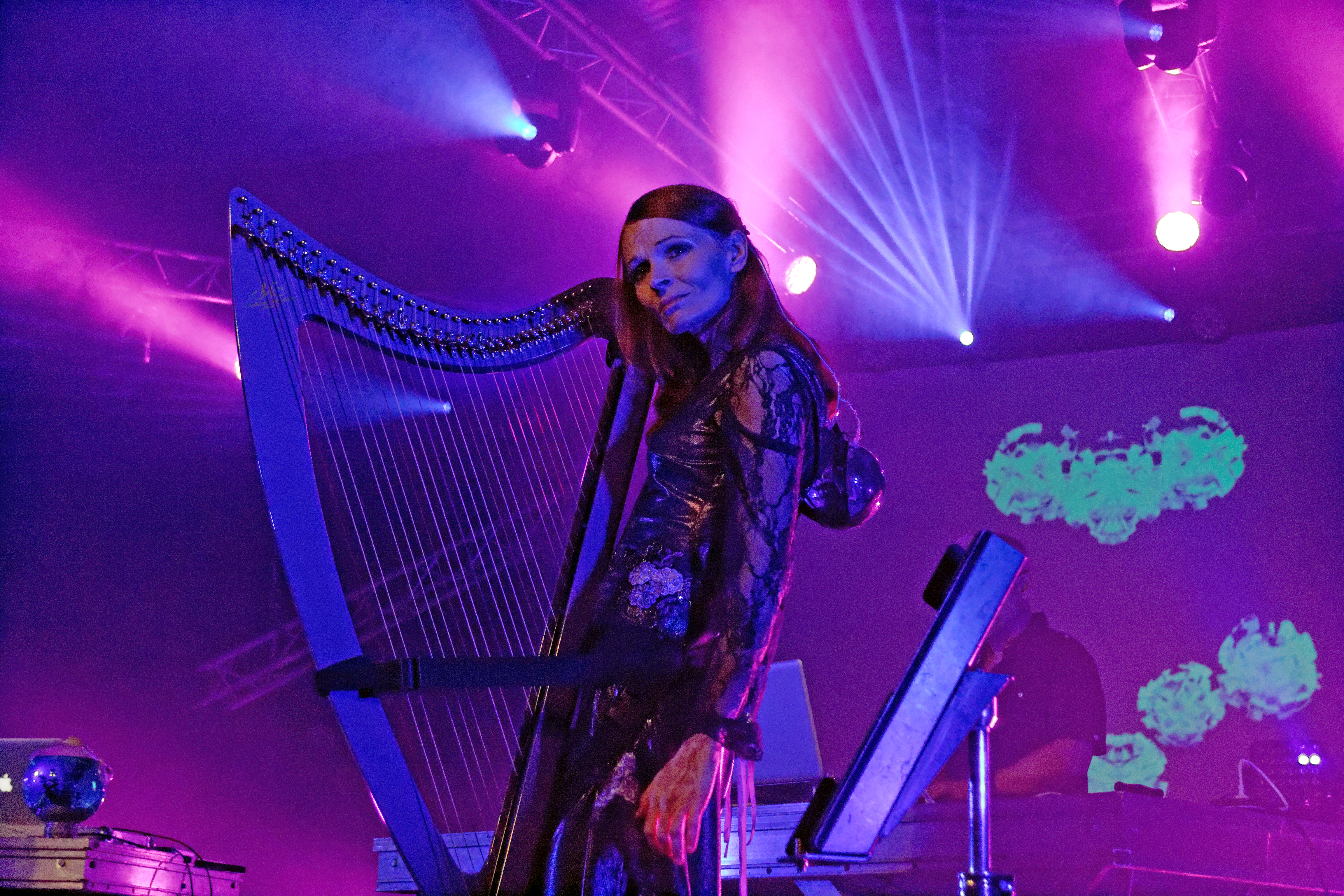 Arneo en concert à l'espace Pierre-Jakez Hélias lors du festival de Cornouaille 2014.